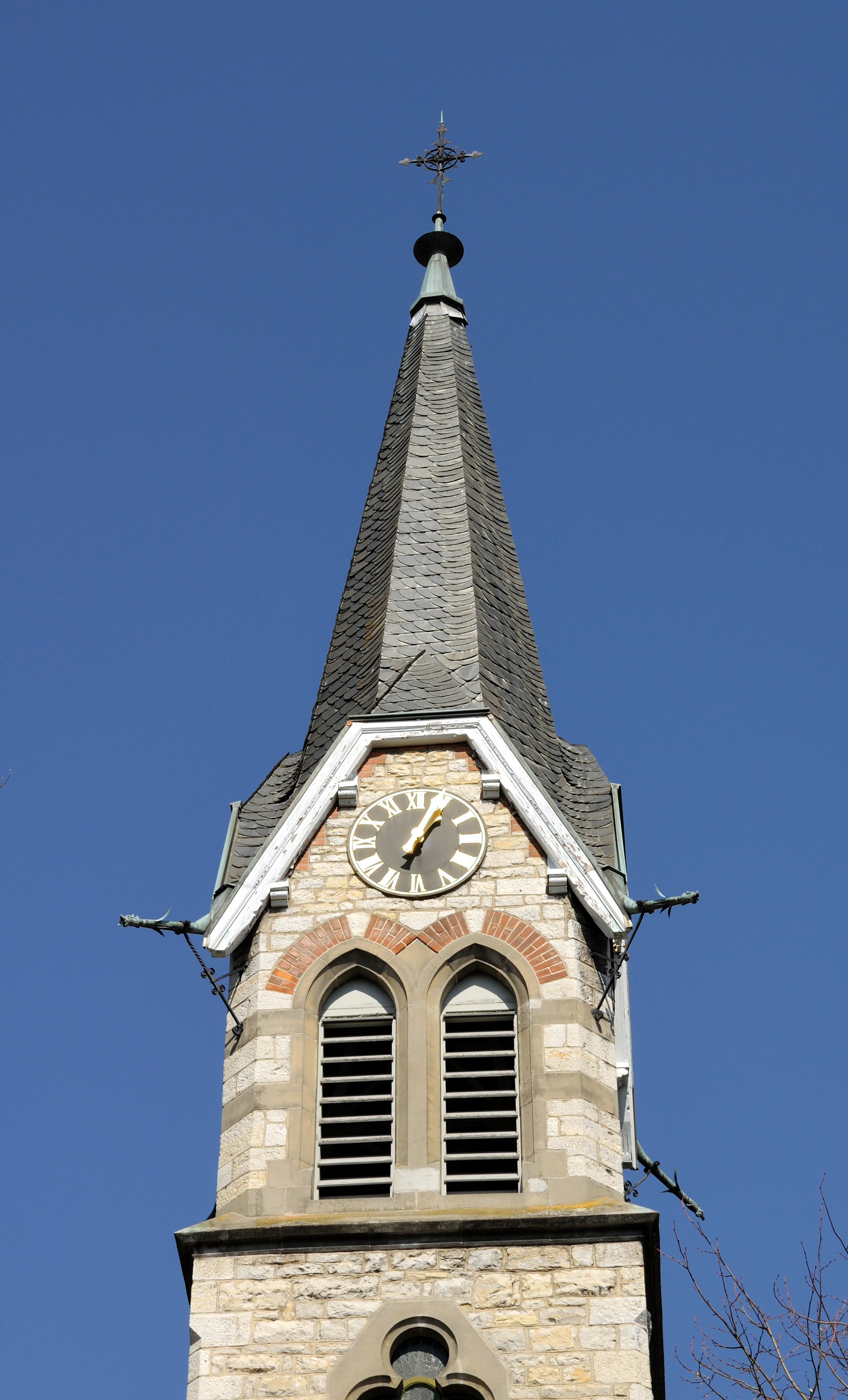 Wyhlen: Friedenskirche, obere Geschosse des Glockenturms